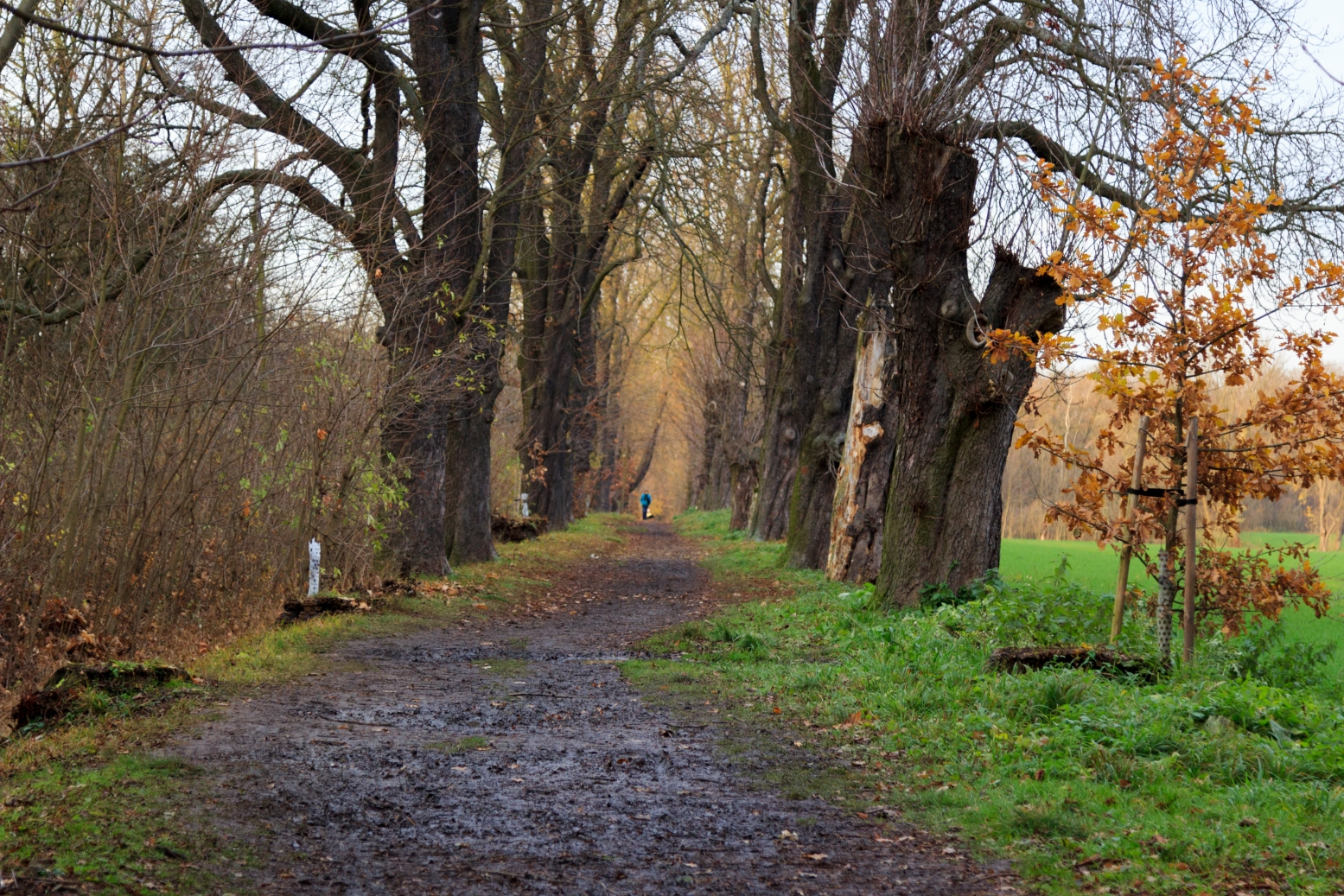 Alej, která spojuje PP Bažantnice v Satalicích s PR Vinořský park